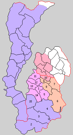 滋賀県栗太郡の町村制時点の町村。